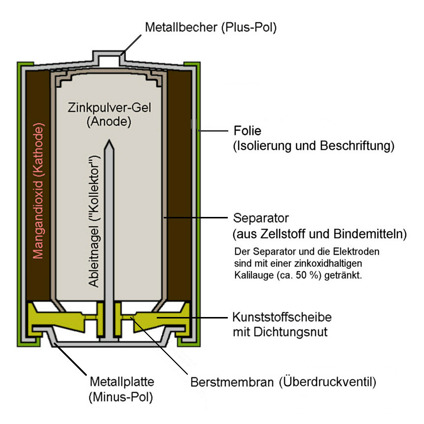 Aufbau (Schnittbild) einer Alkali-Mangan-Batterie nach Angaben von Varta und Duracell Int. Inc.